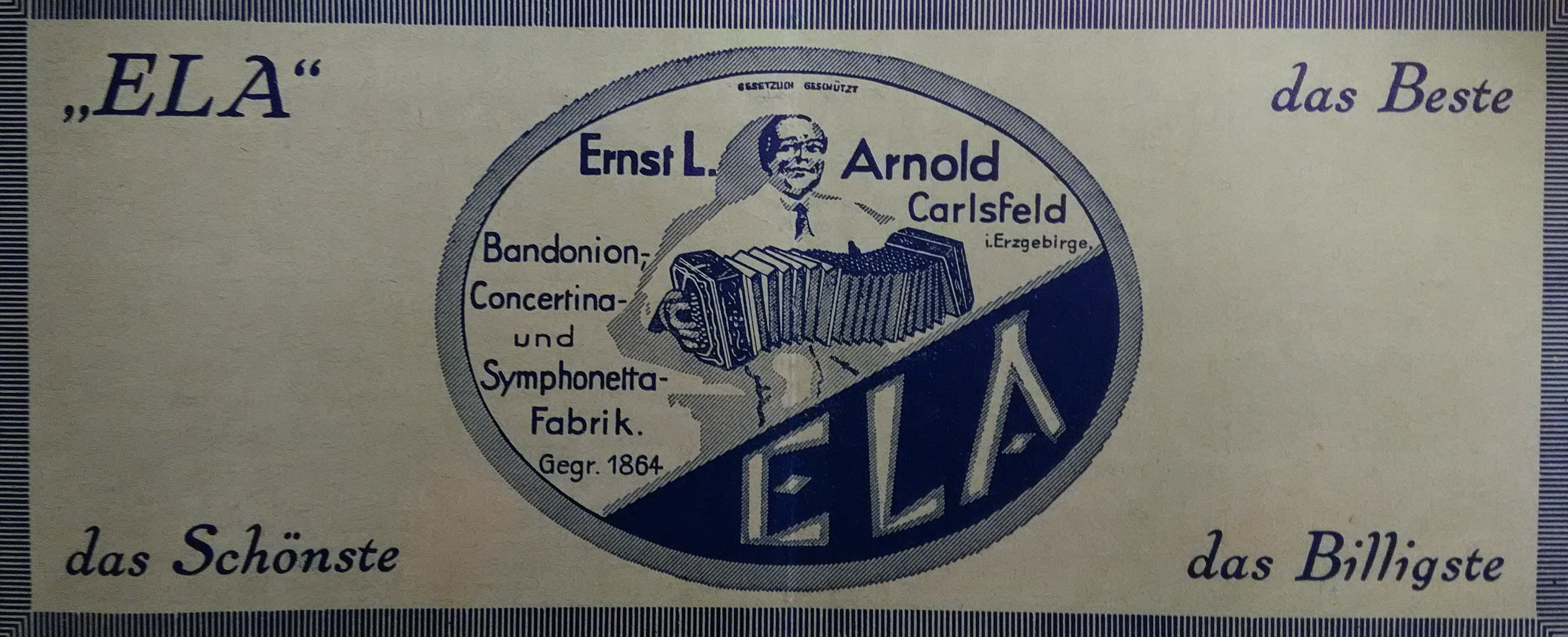 Publicidad del bandoneòn ELA en Alemania revista Gut Ton 1932